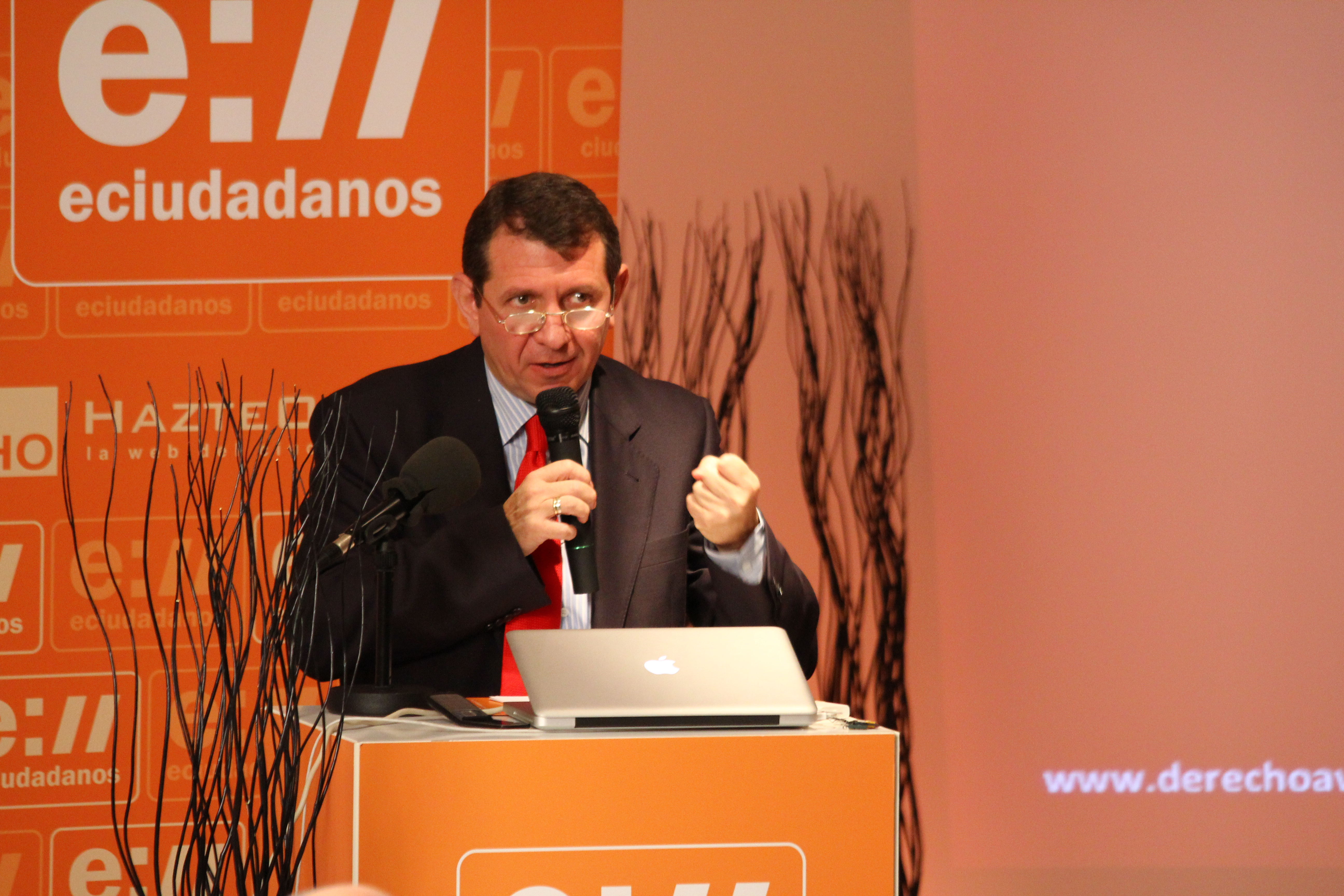 Intervención de José Luis Restán, periodista de la Cadena COPE.